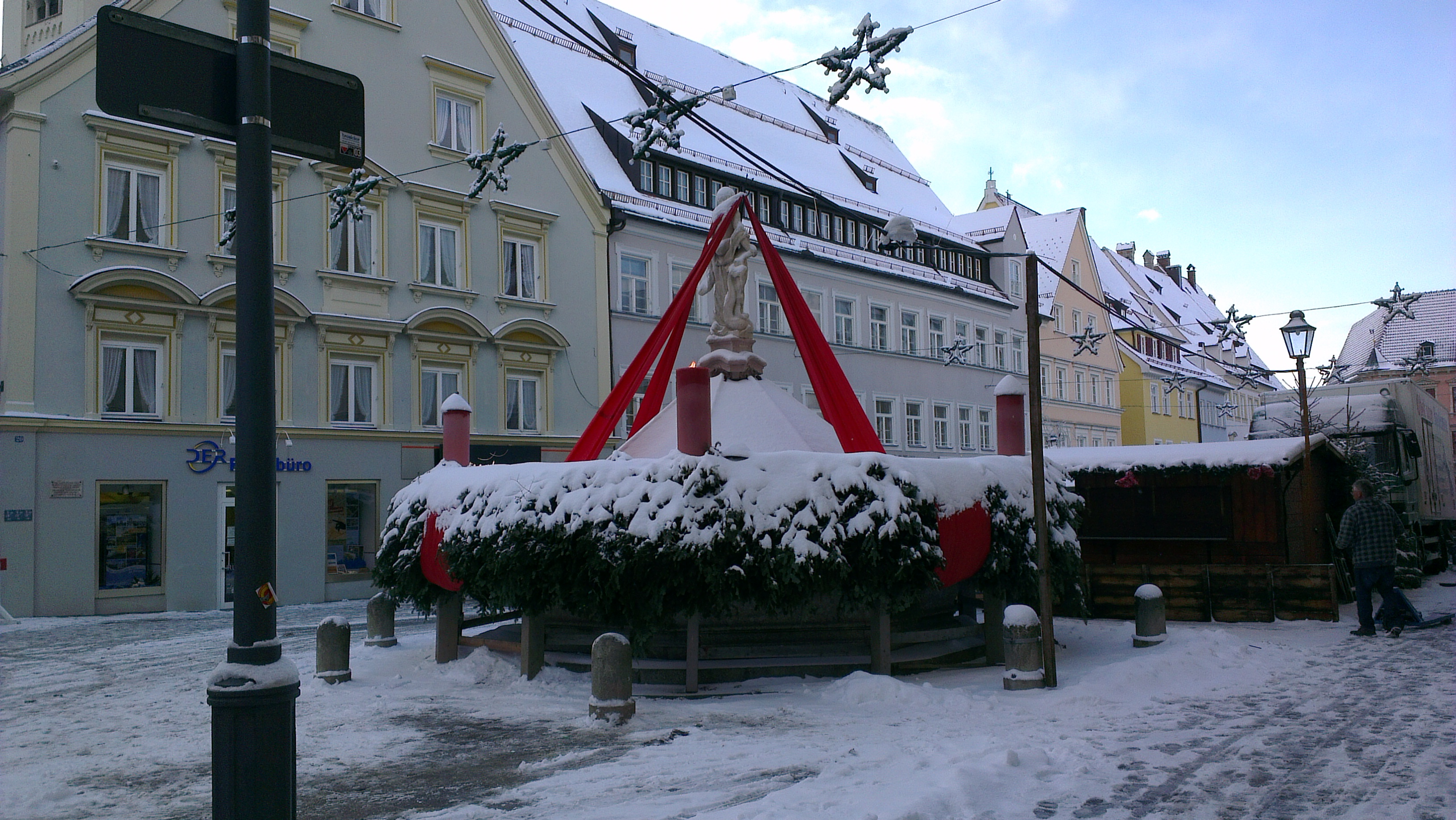 Kaufbeurens Neptunbrunnen trägt Adventskranz